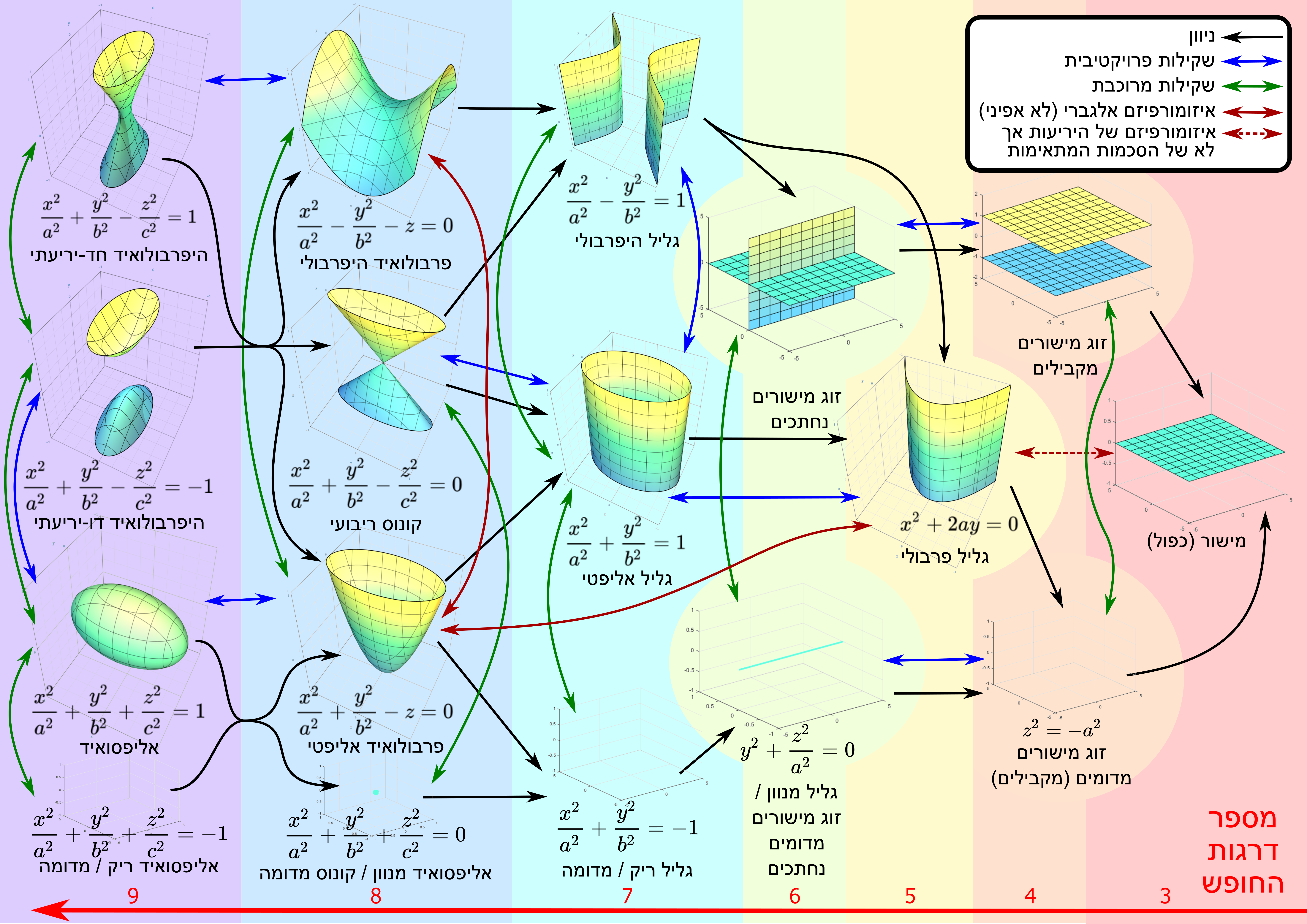 משטחים ריבועיים והקשרים בינהם. מבוסס על איורים שיצר Sam Derbyshire. לקובץ גם גירסה וקטורית בשם Quadratic Surfaces svg